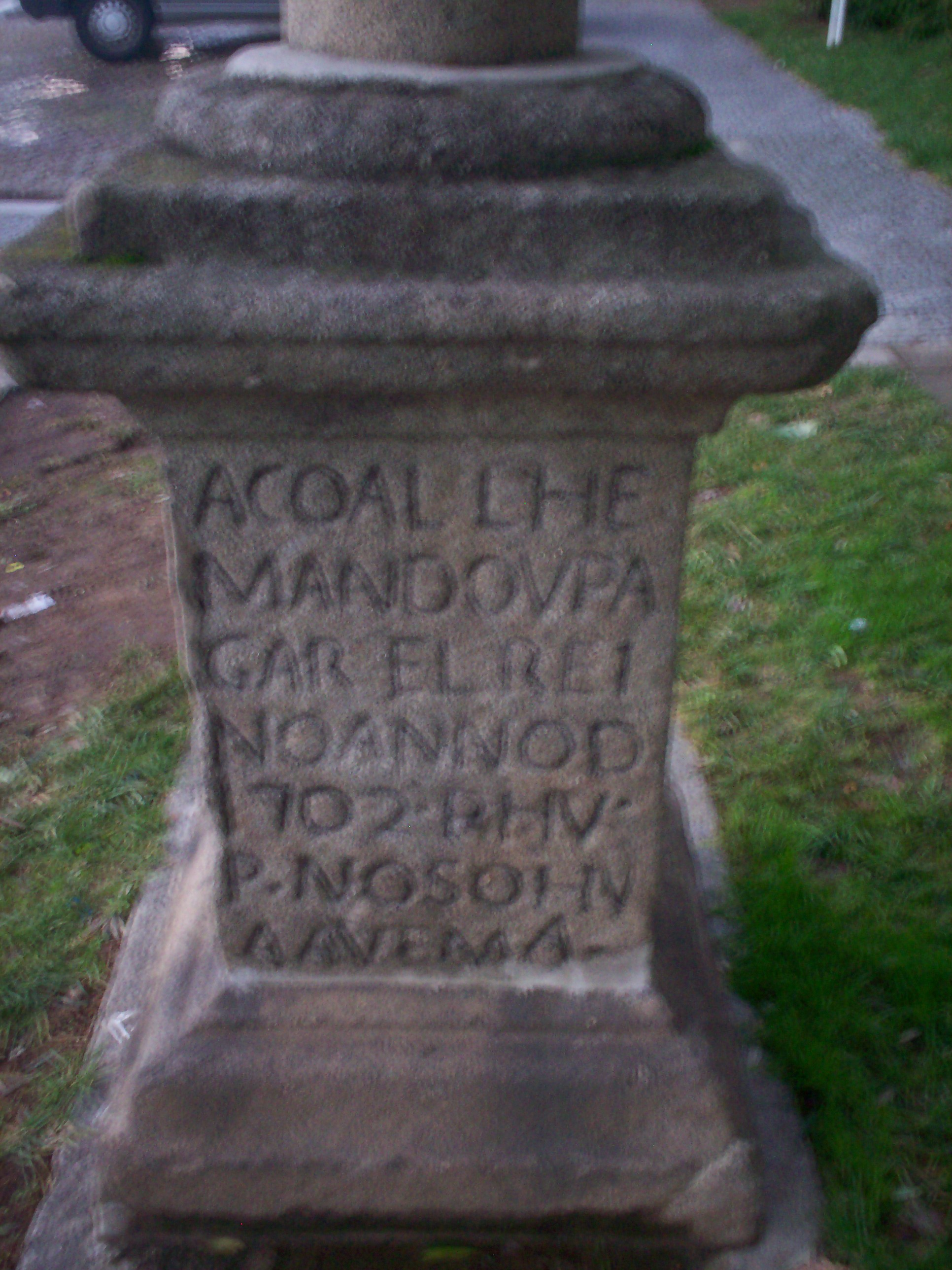 Inscrição referente à construção da ponte de Riba de Ave.